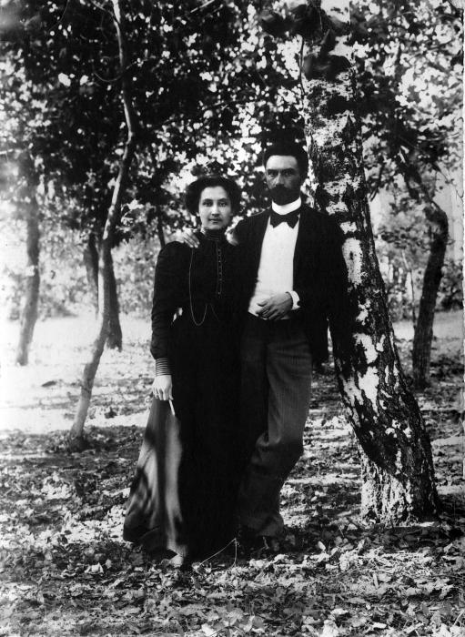 Гучков Константин Иванович с женой Зилоти (Зилотти) Варварой Ильиничной